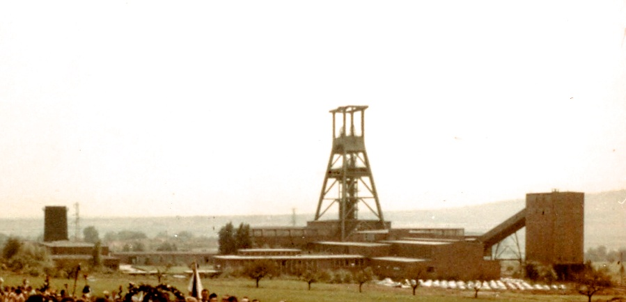 Schachtanlage Georg bei Salzgitter-Hohenrode - Totalansicht mit Förder- und Wasserturm - Aufnahme 1961.